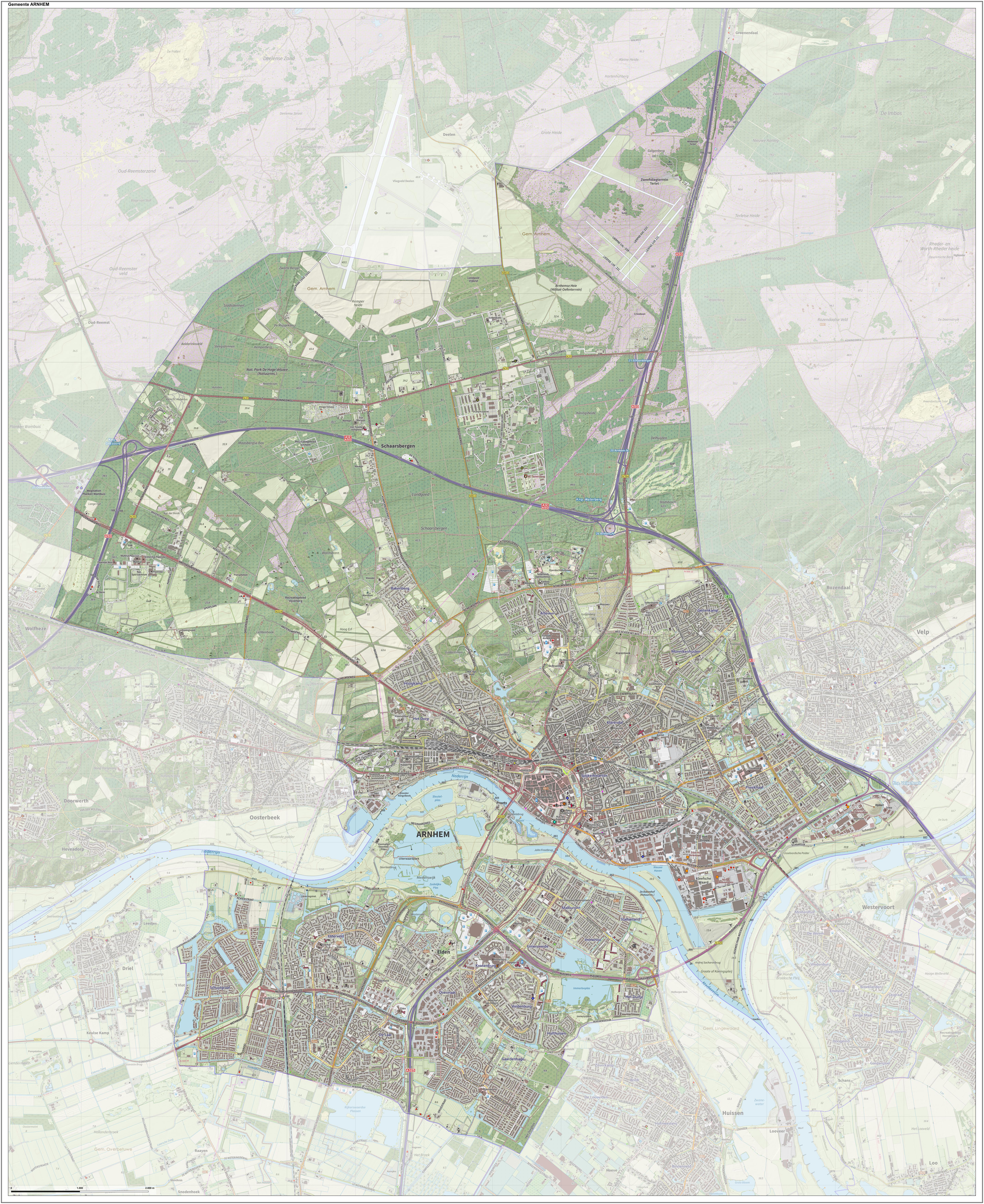 Topografische gemeentekaart. Resolutie: 400 pixels/km. Kaartbeeld samengesteld uit de open geodata van de Top10NL en Top25namen (Kadaster), Creative Commons-BY licentie. Gebouwvlakken uit open geodata BAG extract. Wegen uit de OpenStreetMap, OpenStreetMap community. Reliëfschaduw uit de Actuele Hoogtekaart AHN2. Samenstelling en kleurenschema: Jan-Willem van Aalst, met QGIS. Zie ook de Legenda.